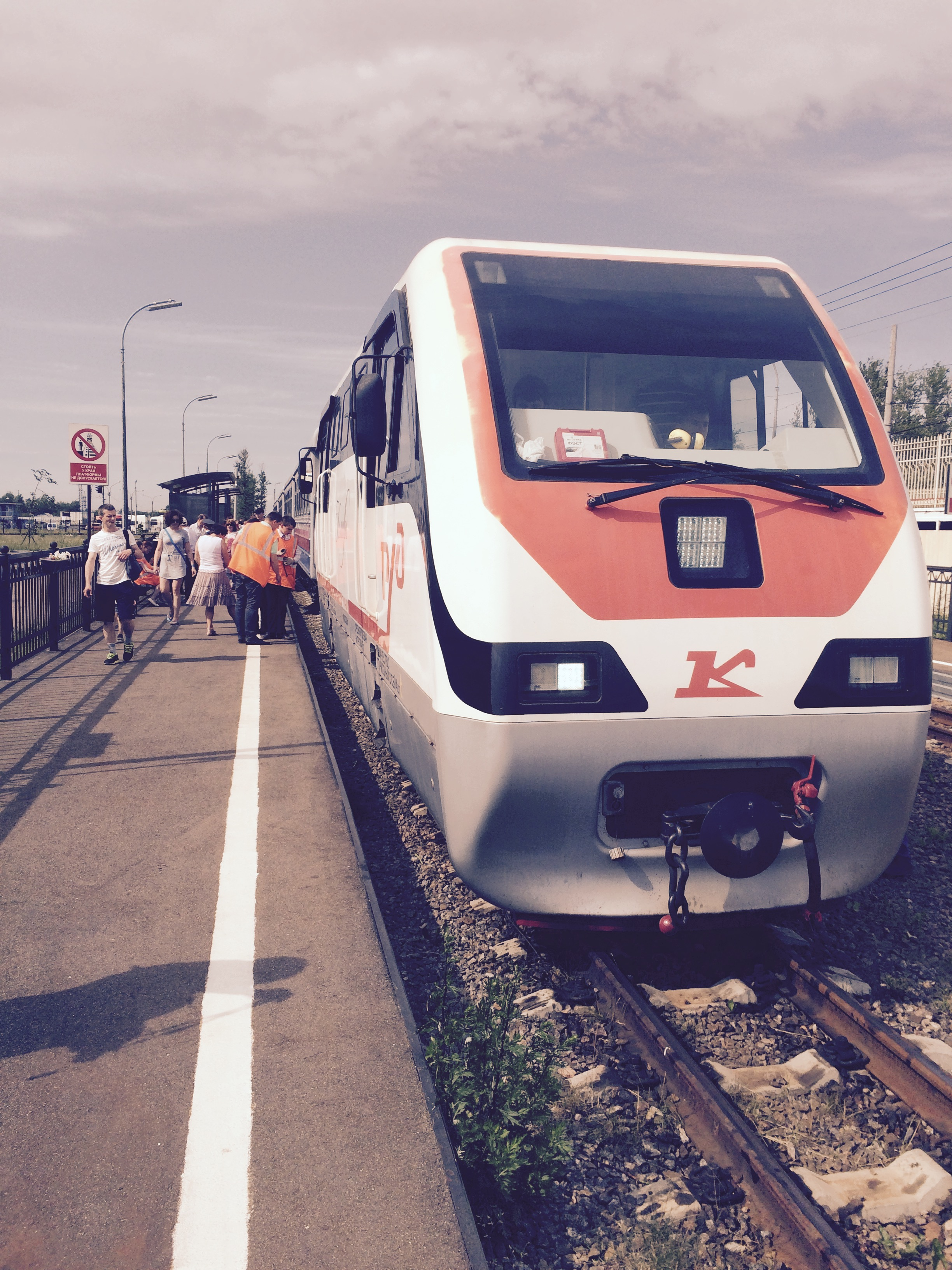 Станция "Царскосельская" Малой Октябрьской железной дороги